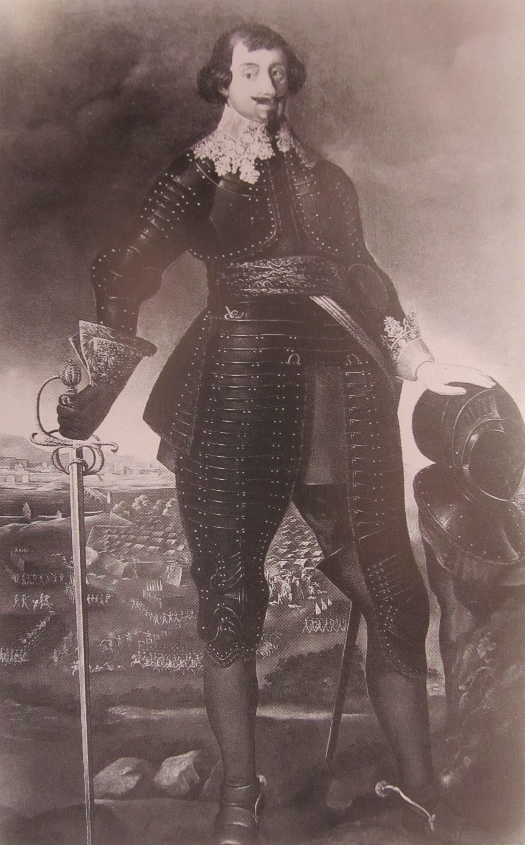 Hrabě František Magnis.